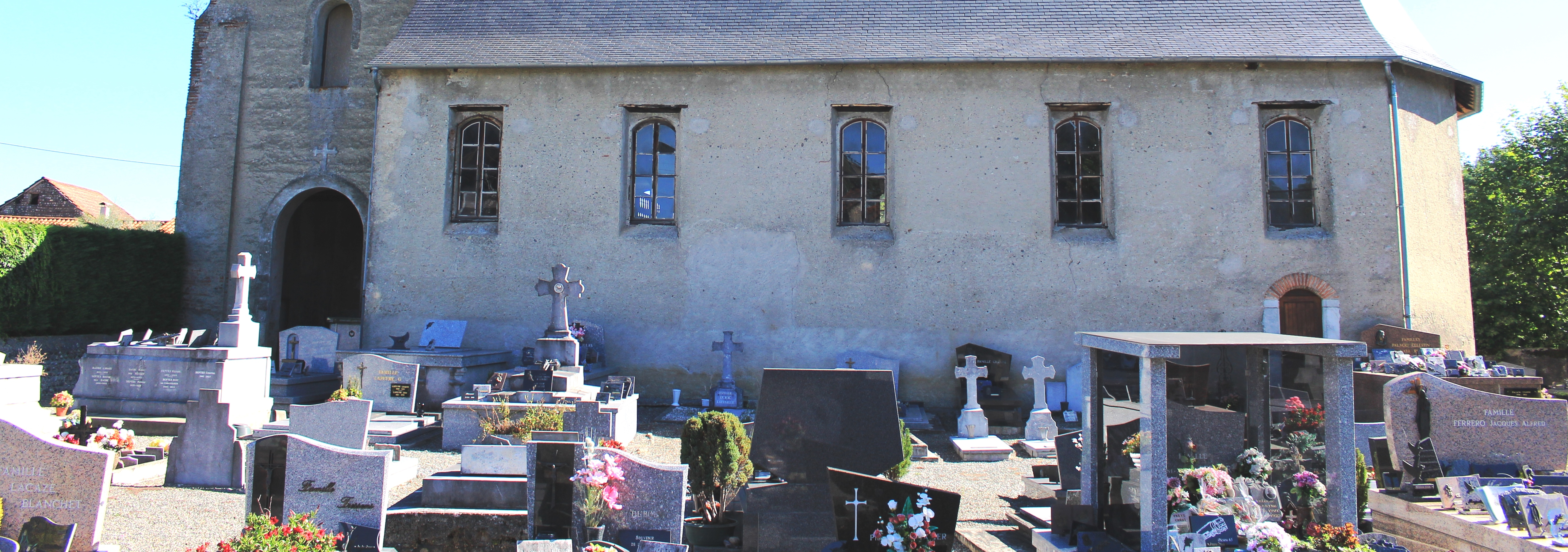 Cimetière de Sarniguet (Hautes-Pyrénées)